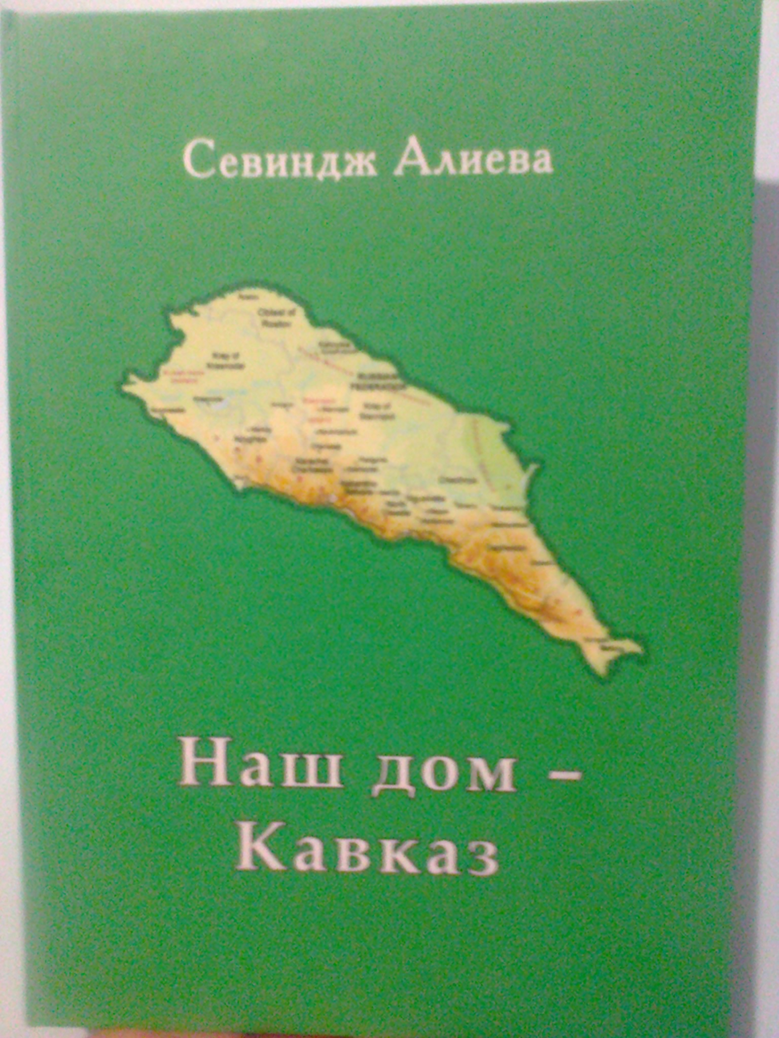 Sevinc Əliyeva